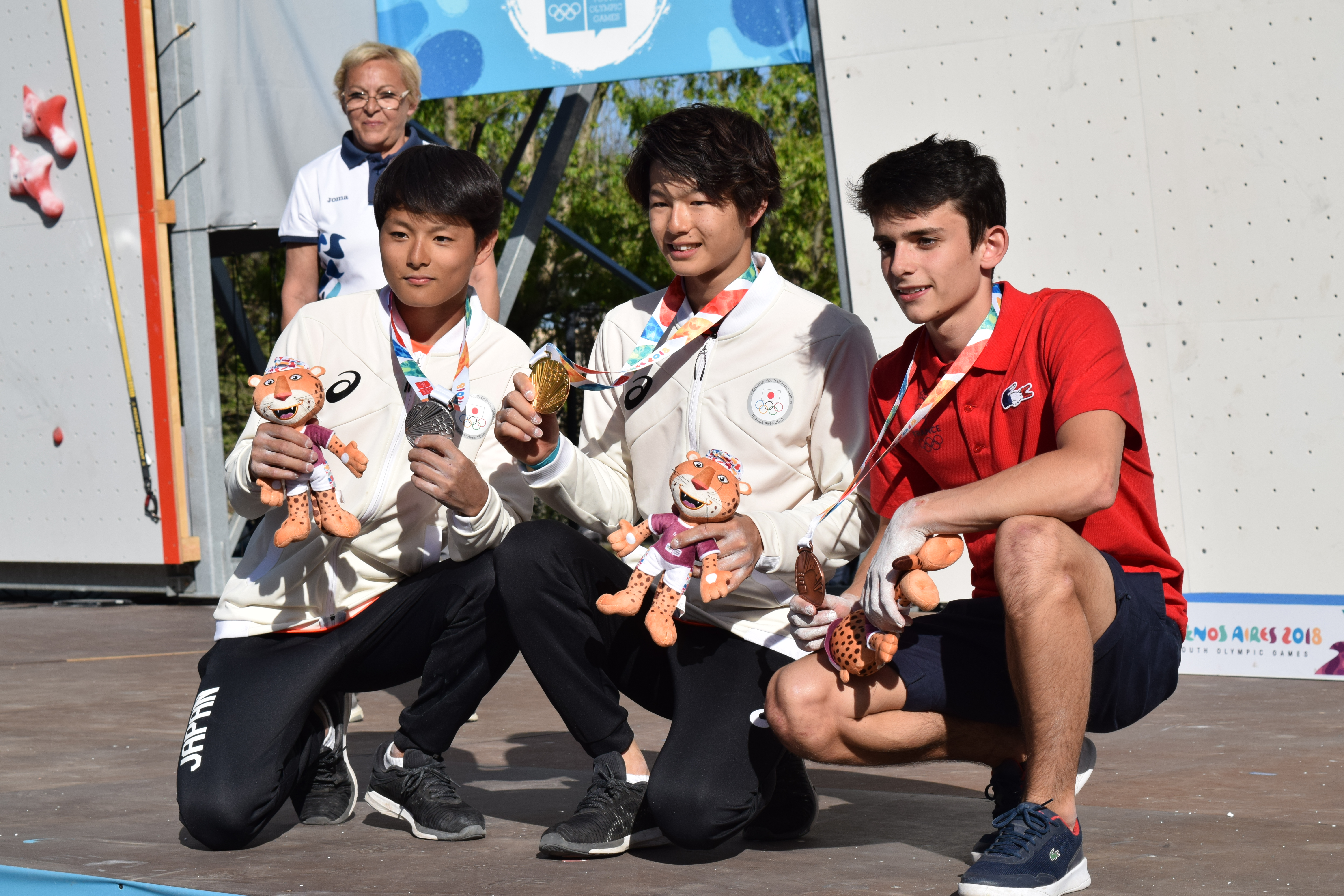 Prueba de escalada combinada final, durante los Juegos Olímpicos de la Juventud 2018 en Buenos Aires. Medallistas Shuta TANAKA (Plata), Keita DOHI (Oro) y medallista Sam AVEZOU (Bronce).